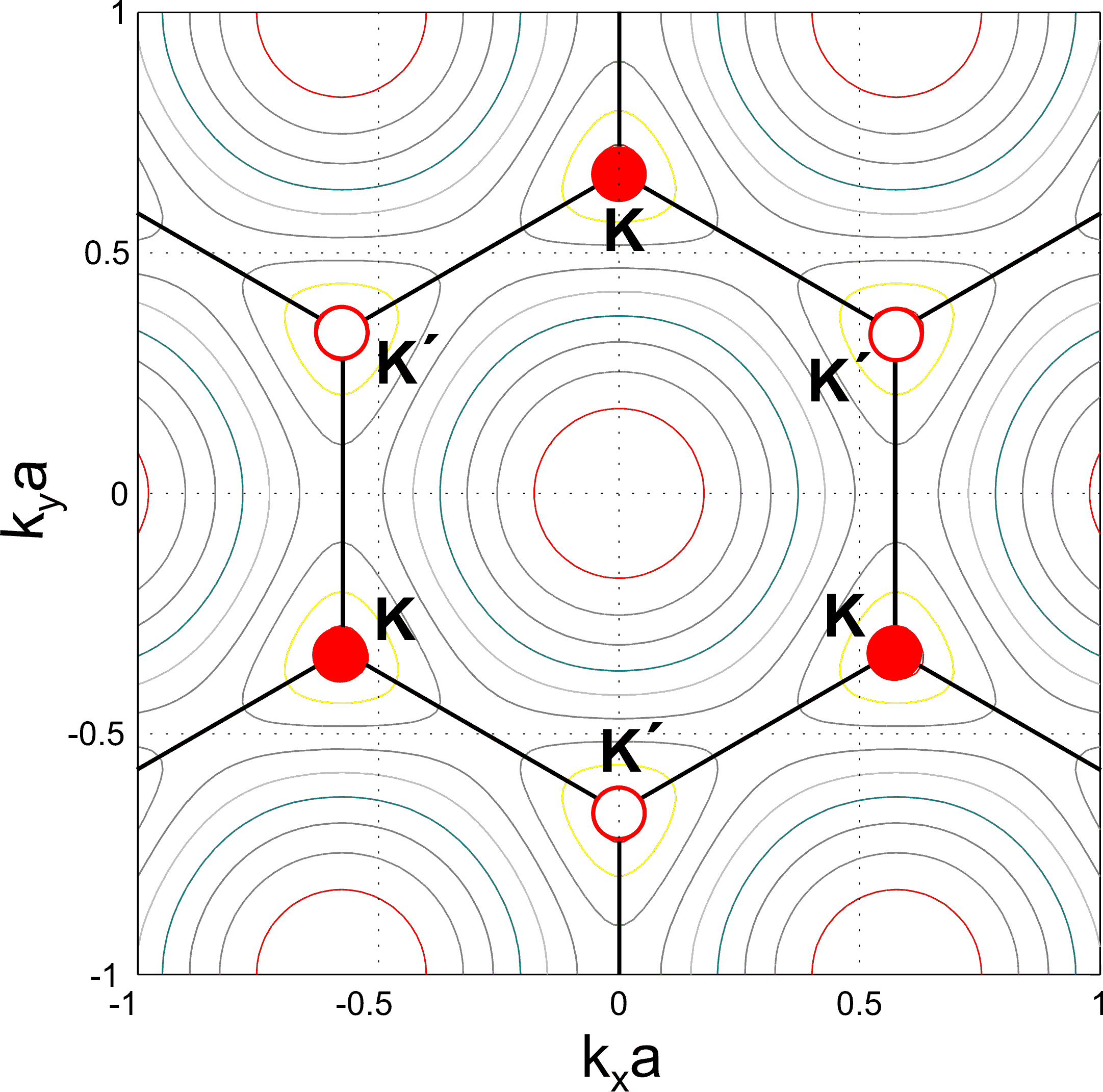 Изолинии постоянной энергии, энергетического спектра графена, полученного в приближении сильно связанных электронов.